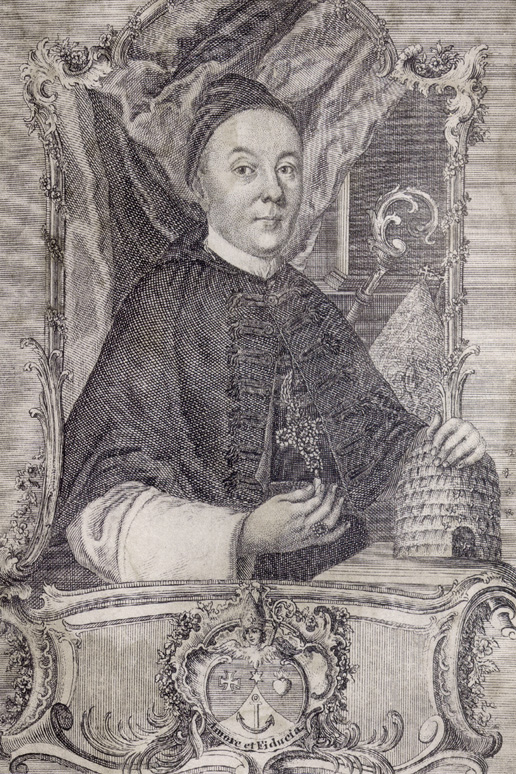 Abt Emanuel II Mayr von Raitenhaslach (1717 – 1780); Kupferstich von Joseph Anton Zimmermann